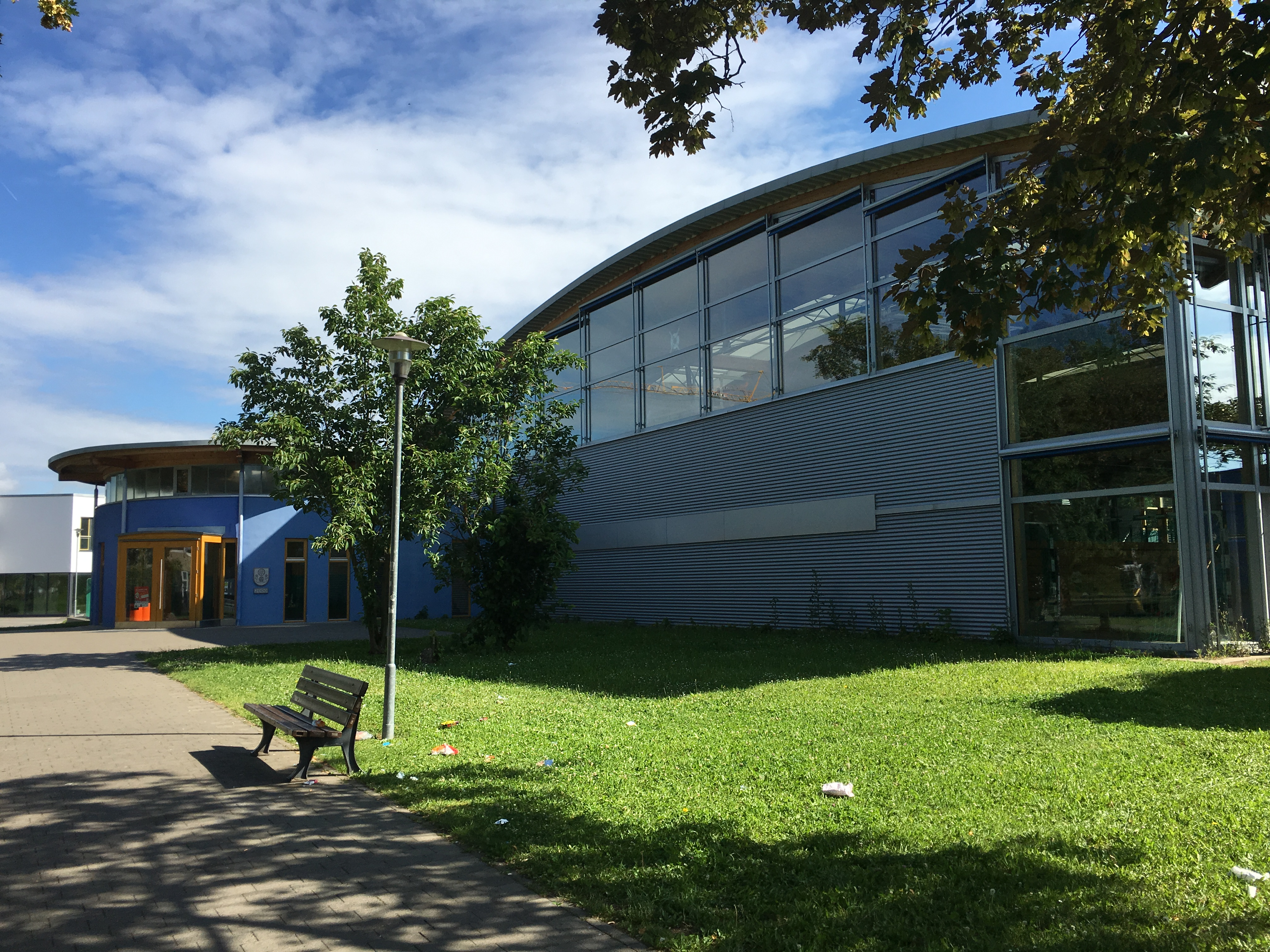 Wörthalle Tauberbischofsheim